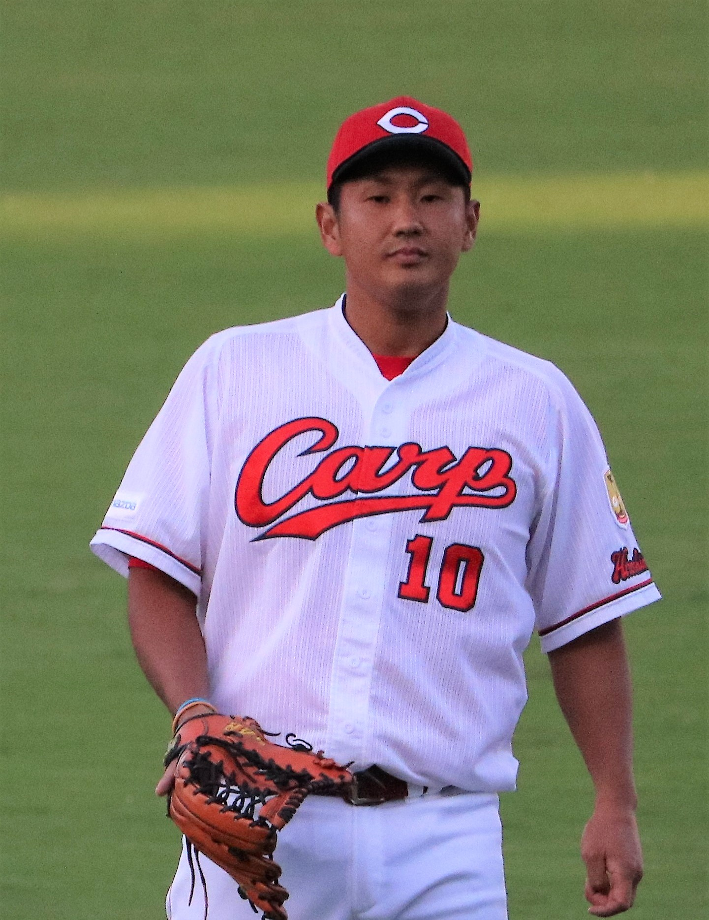 2017/9/28 マツダスタジアム